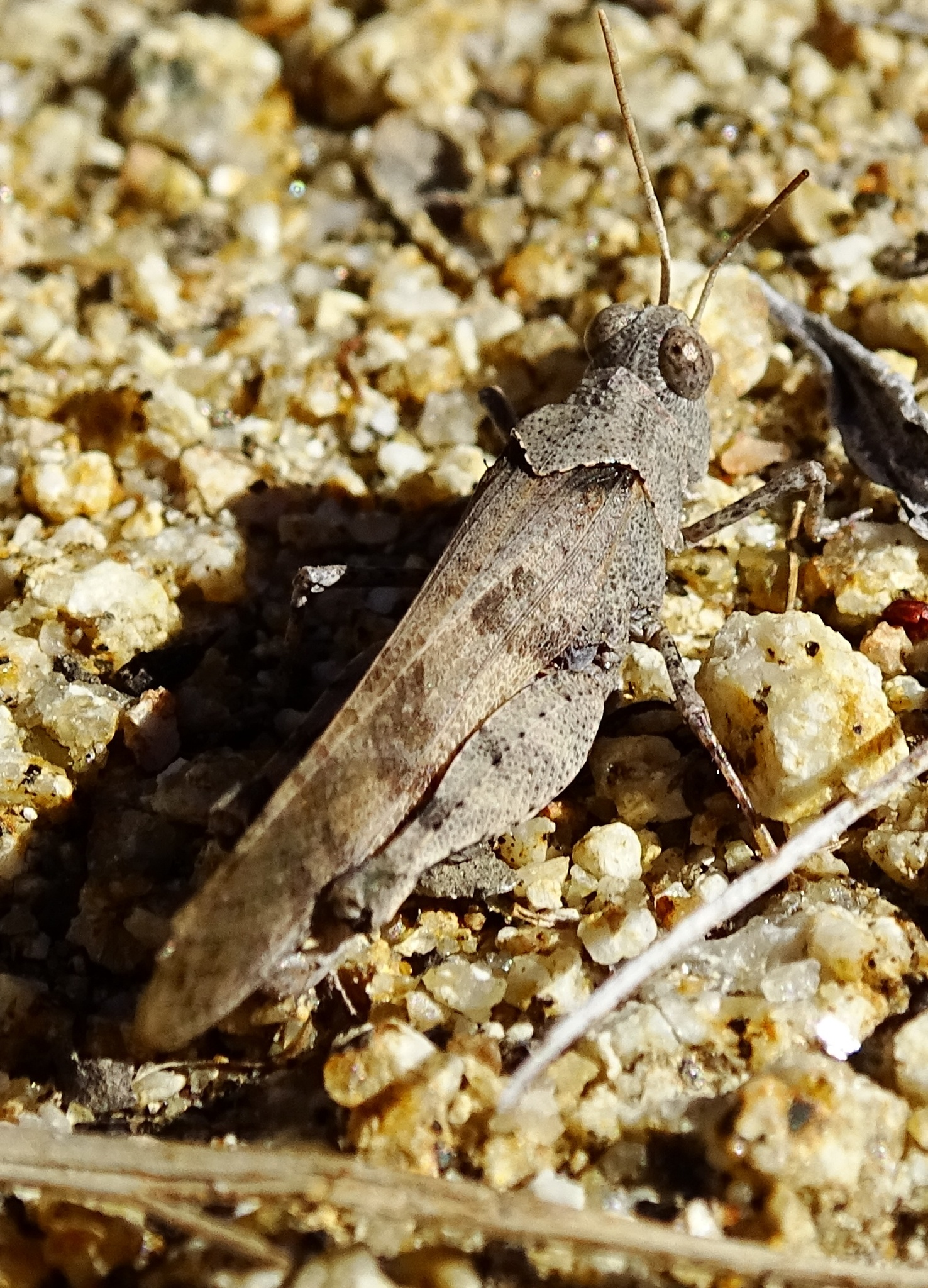 Trimerotropis thalassica en Cleveland